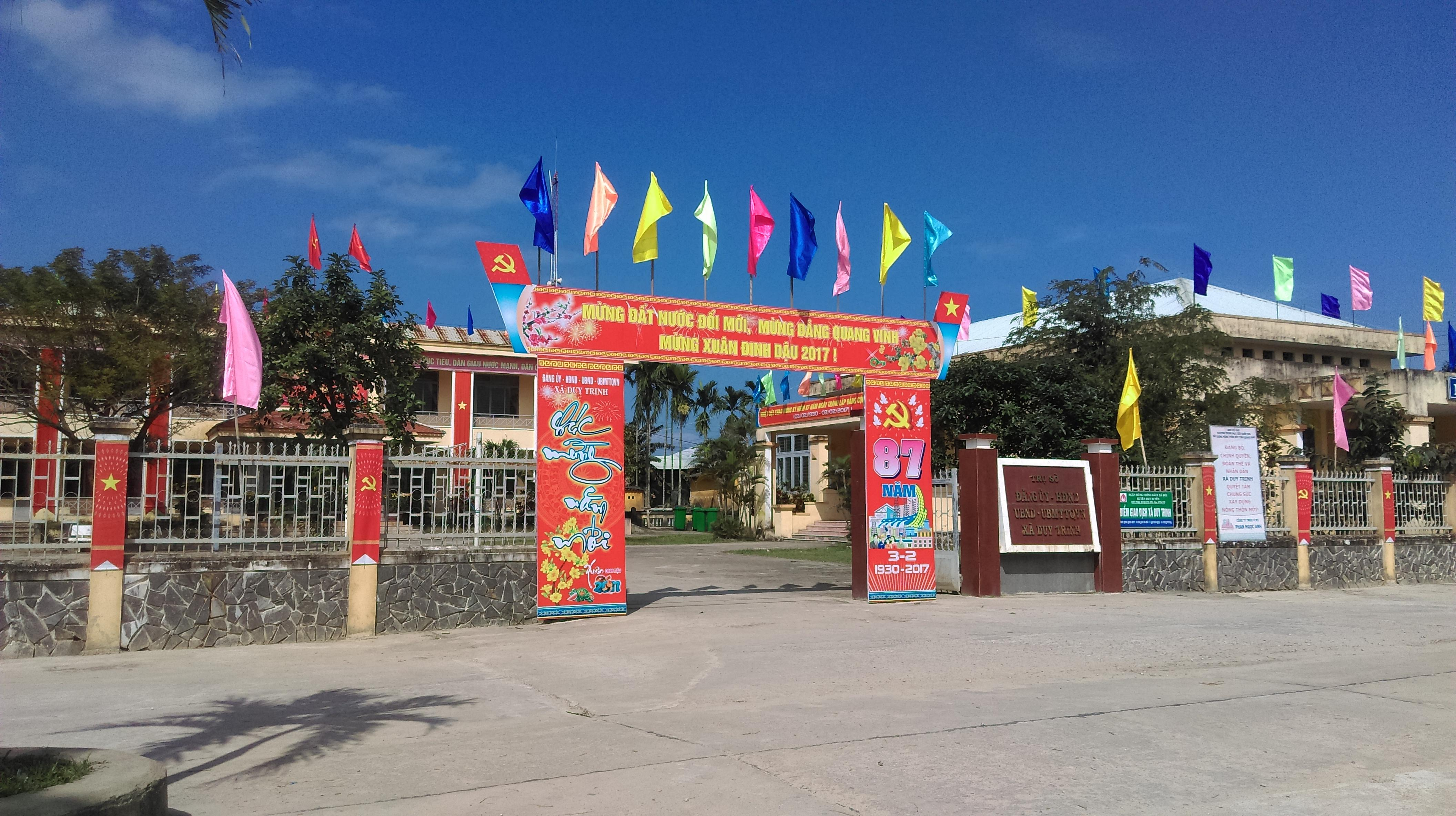 UBND xã Duy Trinh, Duy Xuyên, Quảng Nam